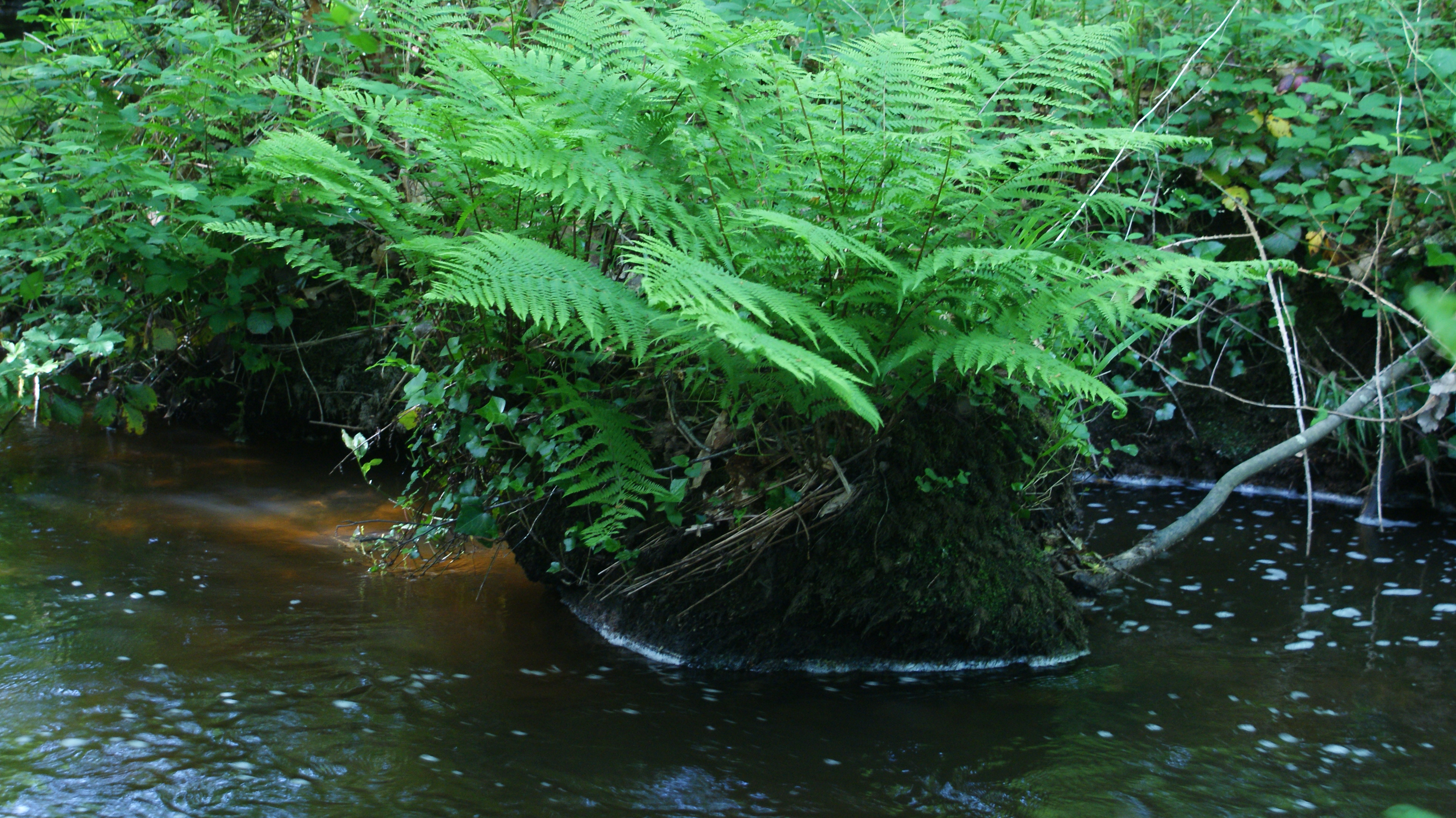 Fougères sur un rocher à St Estephe